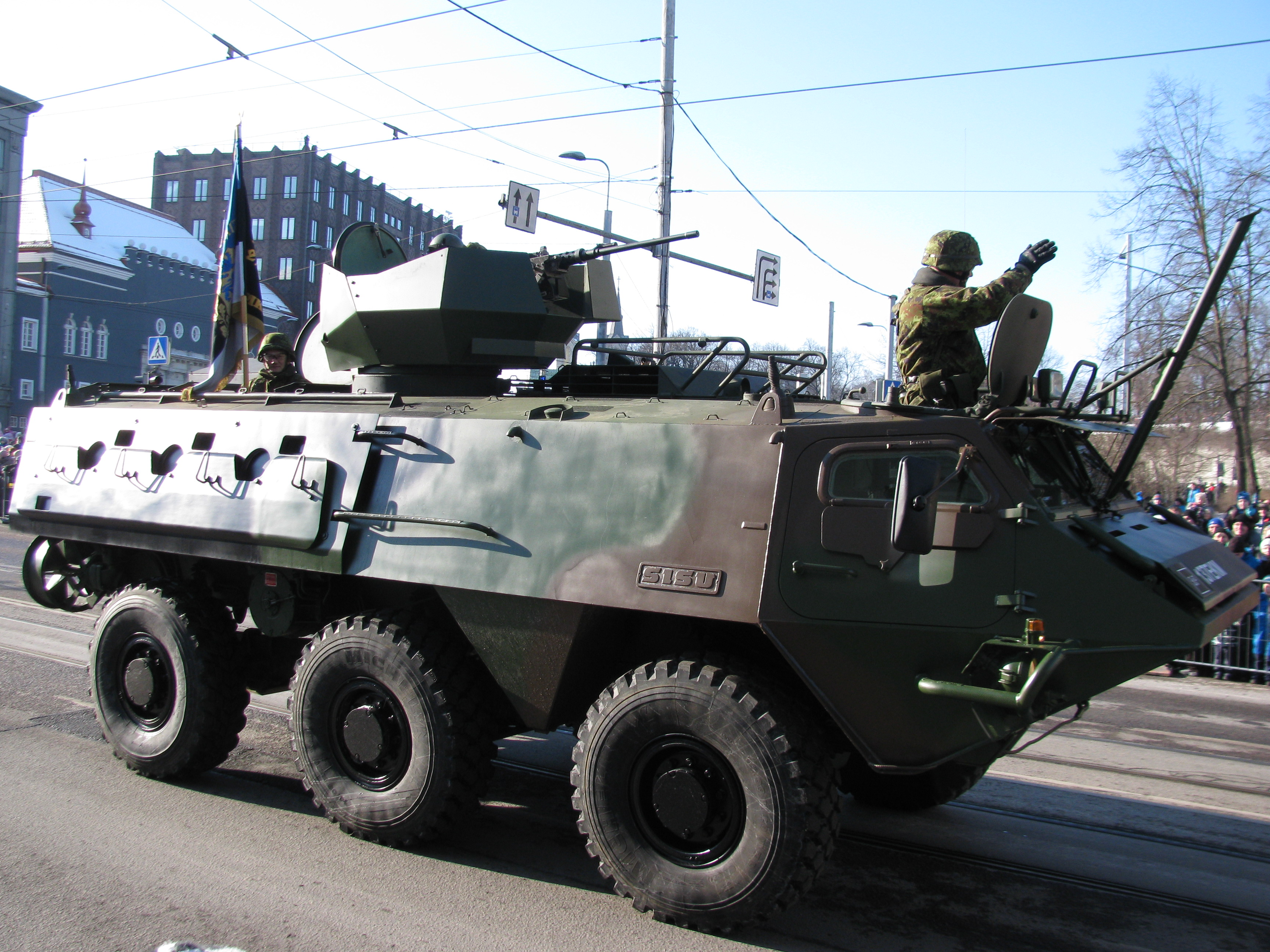 Pasi soomuk Kaitseväe paraadil